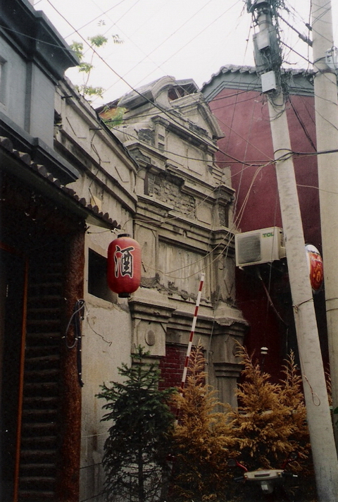 烟袋斜街28号 smartneddy 2004年下摄于什刹海